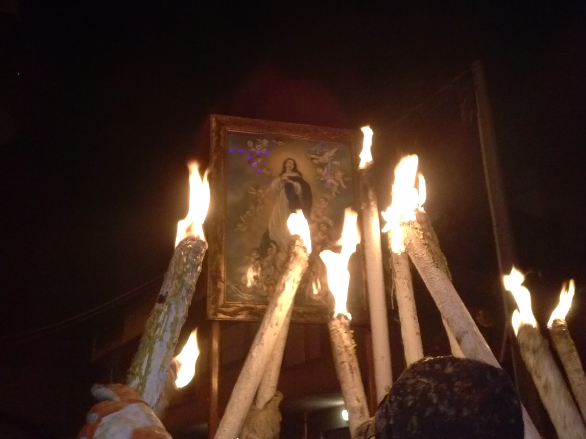 Processione Quadrittu